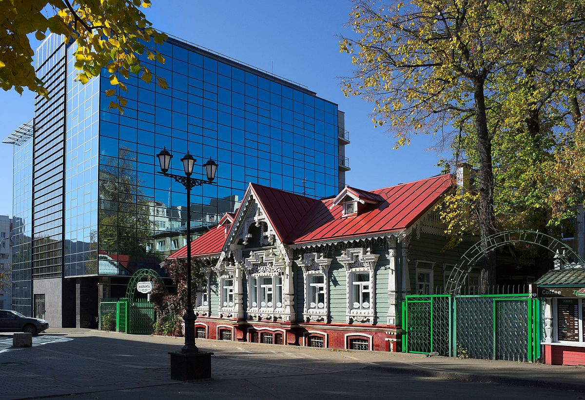 Особняк К.Ф. Токаревой: Пермская улица, 67 / Комсомольский проспект, Пермь, Пермский край